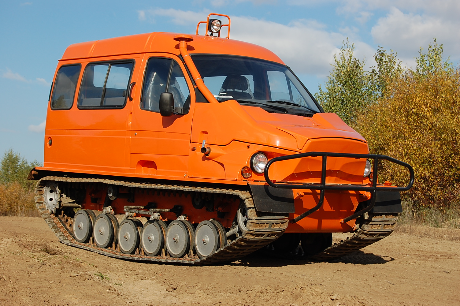 гусеничный снегоблотоход ГАЗ-3409 "Бобр", производства ЗАО "ЗЗГТ"